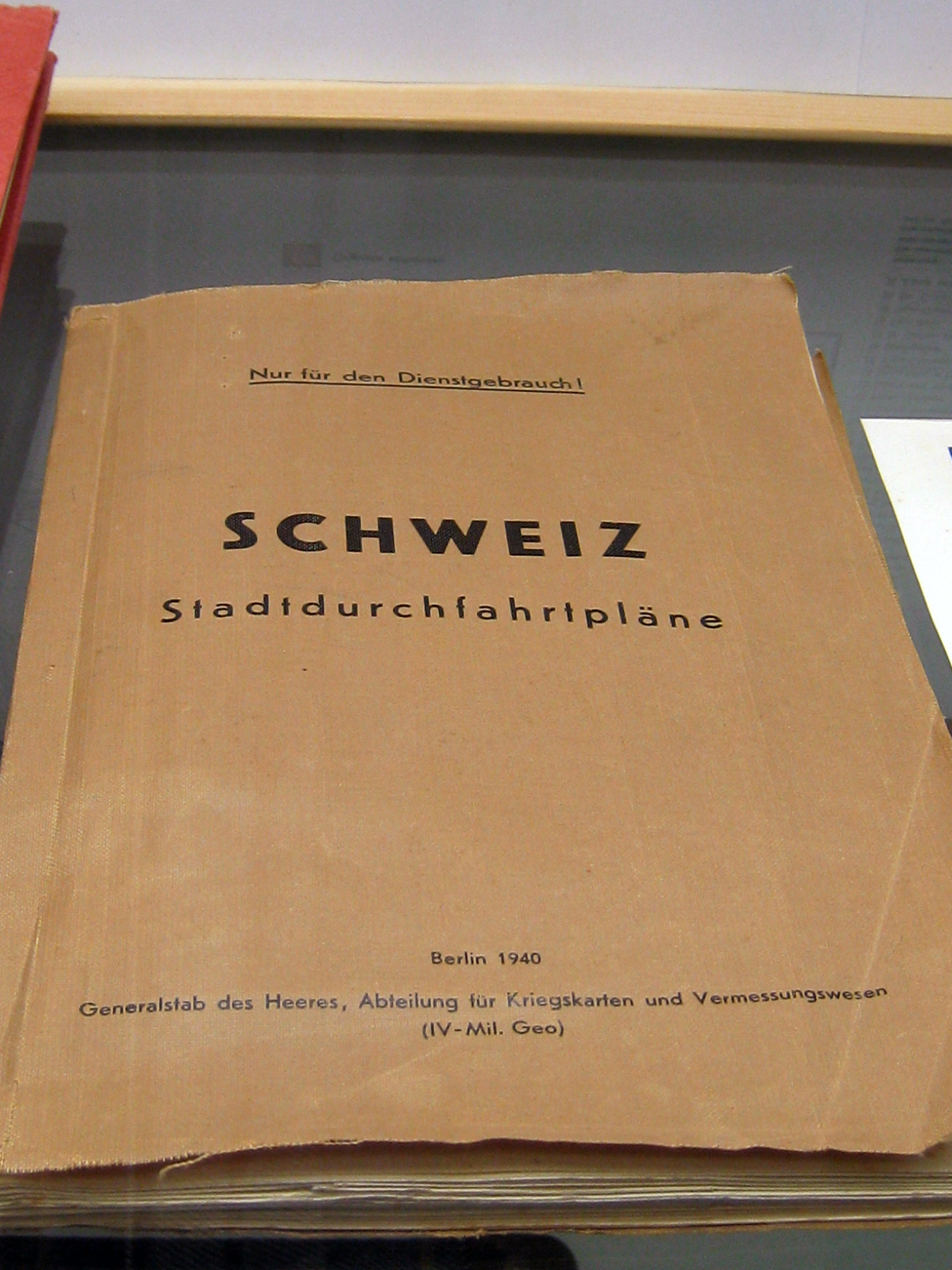 Schweizer Stadtpläne der deutschen Wehrmacht im Festungsmuseum Reuenthal